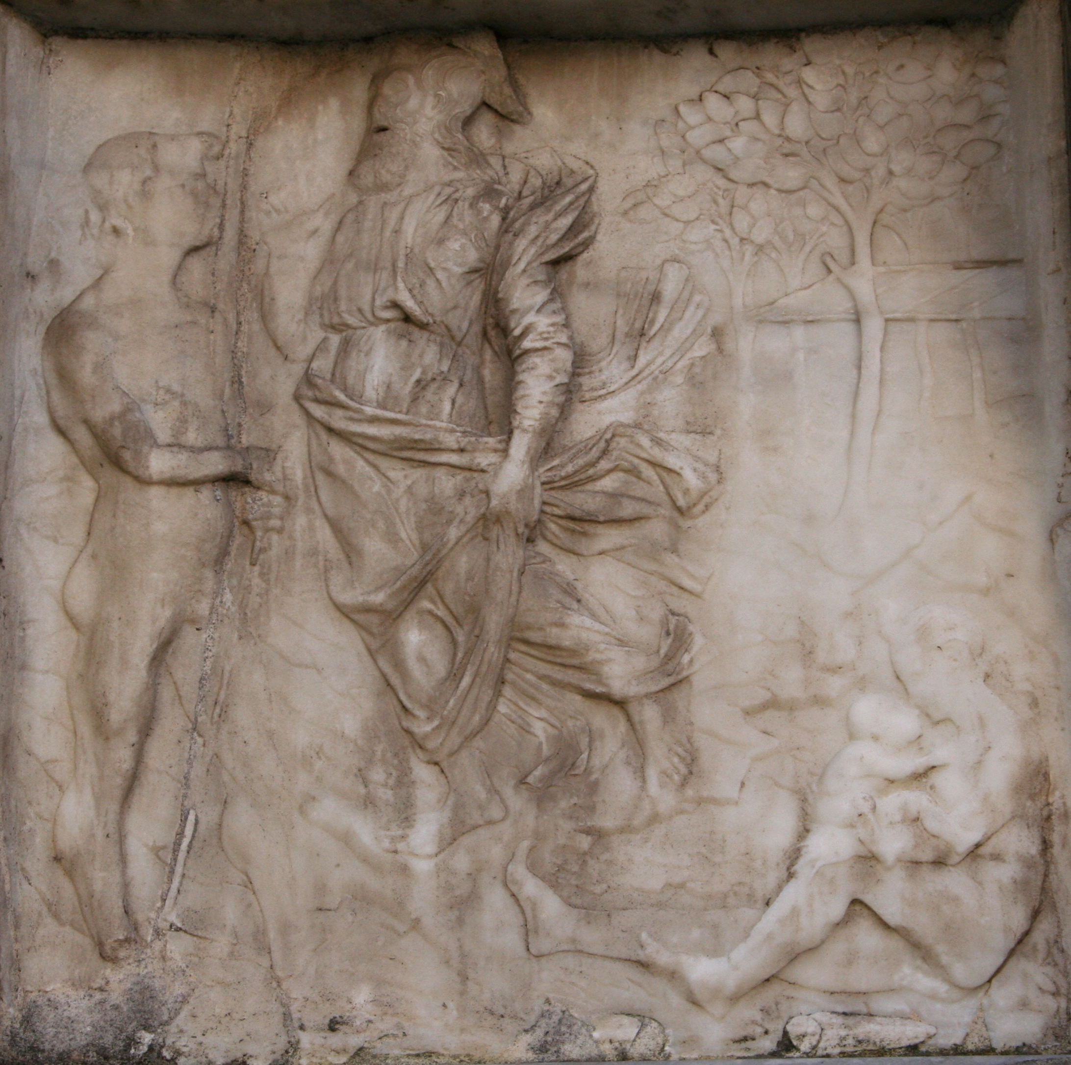 Cappella Colleoni, rilievi alla base della facciata. Opera di Giovanni Antonio Amadeo